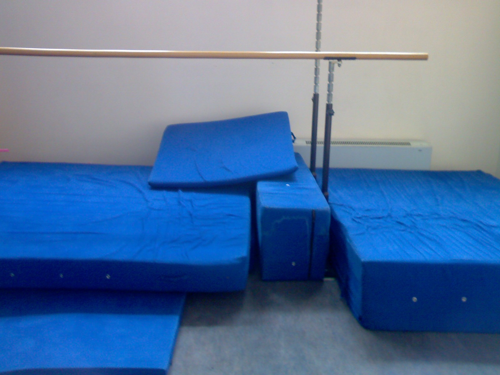 Bilfen Ataşehir İlkokulu, (Bilfen Atasehir Primary School)